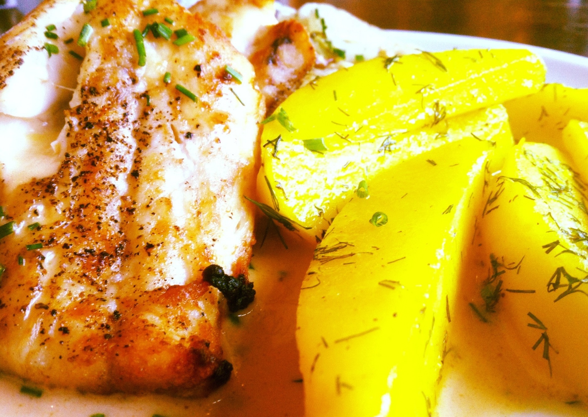 Hechtfilet mit Butterkartoffeln im Michelberger Hotel, Berlin